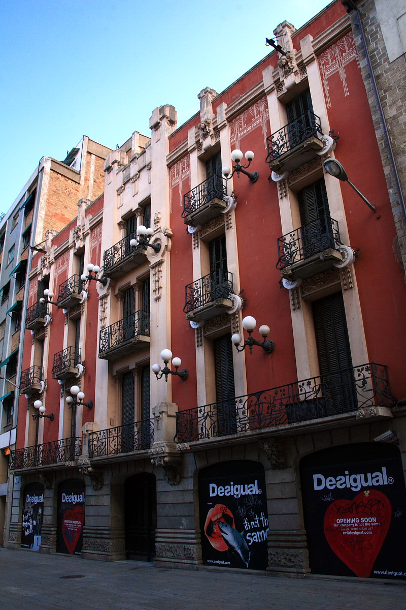 Antics magatzems Cendra i Caralt, c/ dels Arcs, 10. El 1946 s'hi va instal·lar la Hidroelèctrica de Catalunya. Actualment s'està rehabilitant per instal·lar un hotel. Obra modernista d'Arnau Calvet i Peyronill de 1905